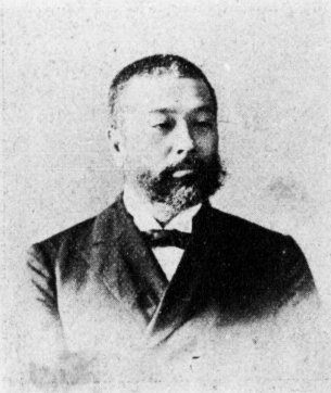 河井重蔵（1854-1925）